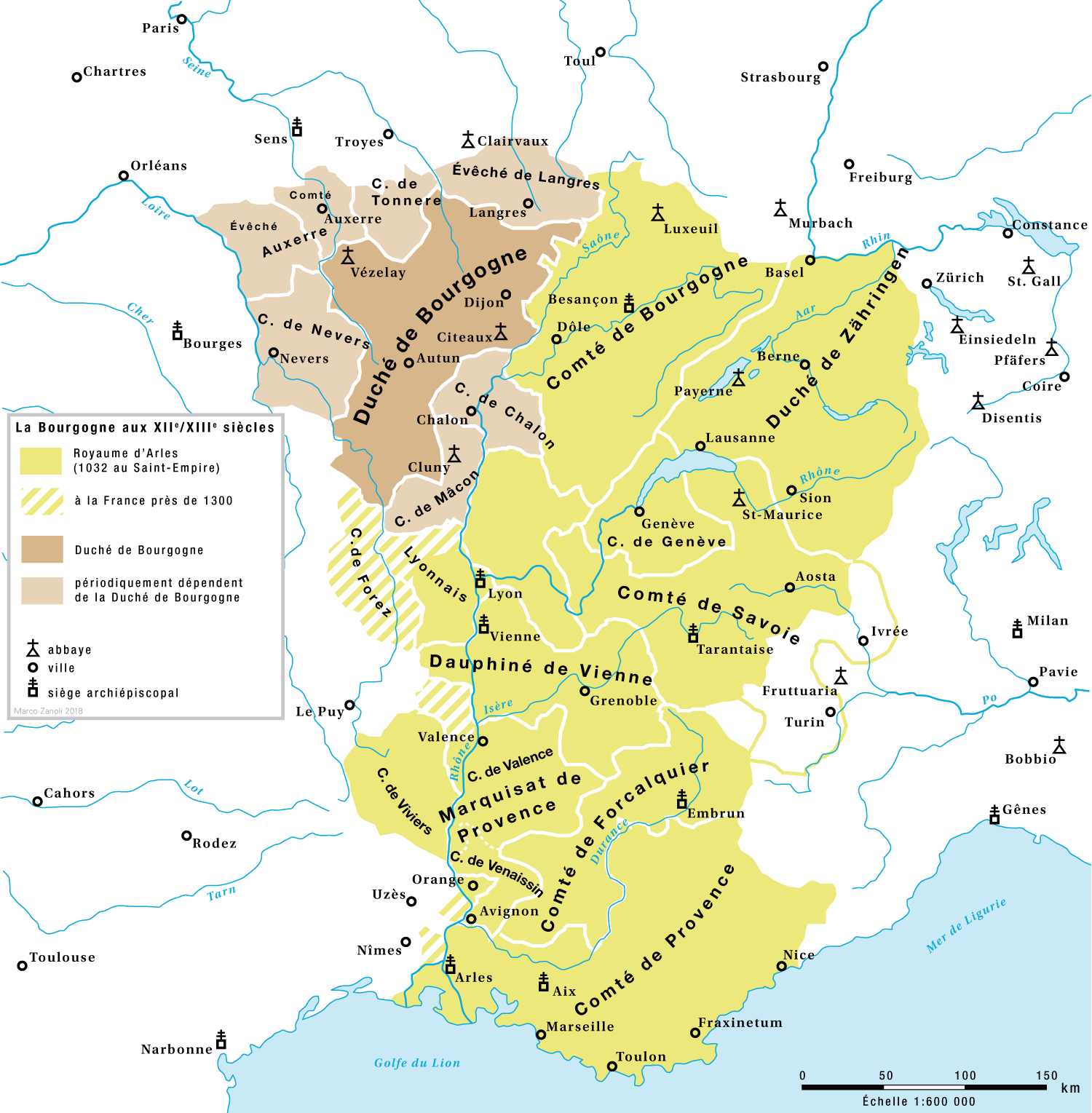 La Bourgogne aux XIIe/XIIIe siècles - le royaume d'Arles et la duché de Bourgogne